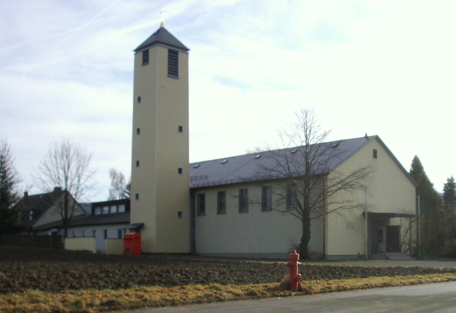 Katholische Kirche - Markt Sparneck (Landkreis Hof, Oberfranken)